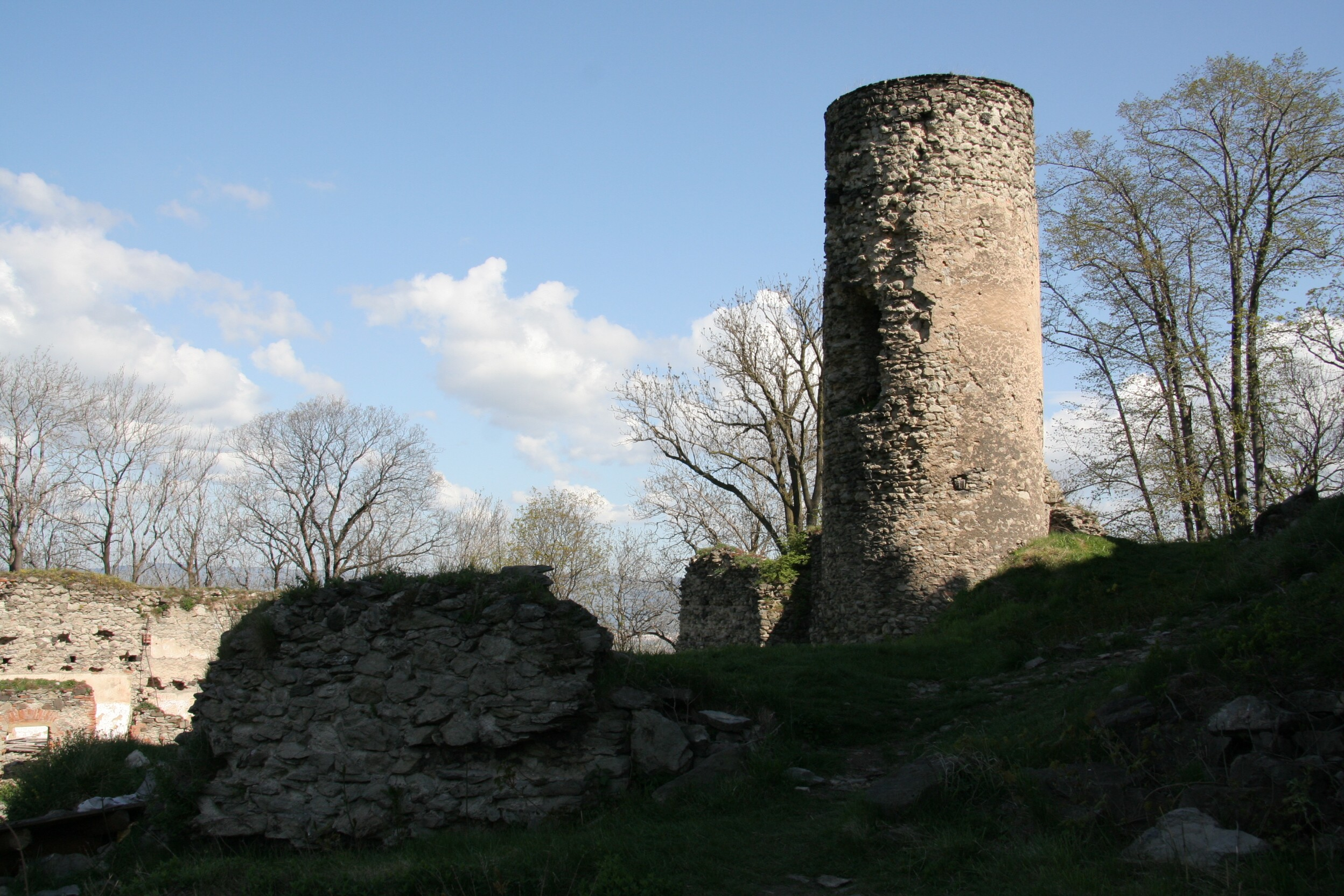 Zřícenina hradu Kostomlaty u Kostomlat pod Milešovkou v Českém středohoří